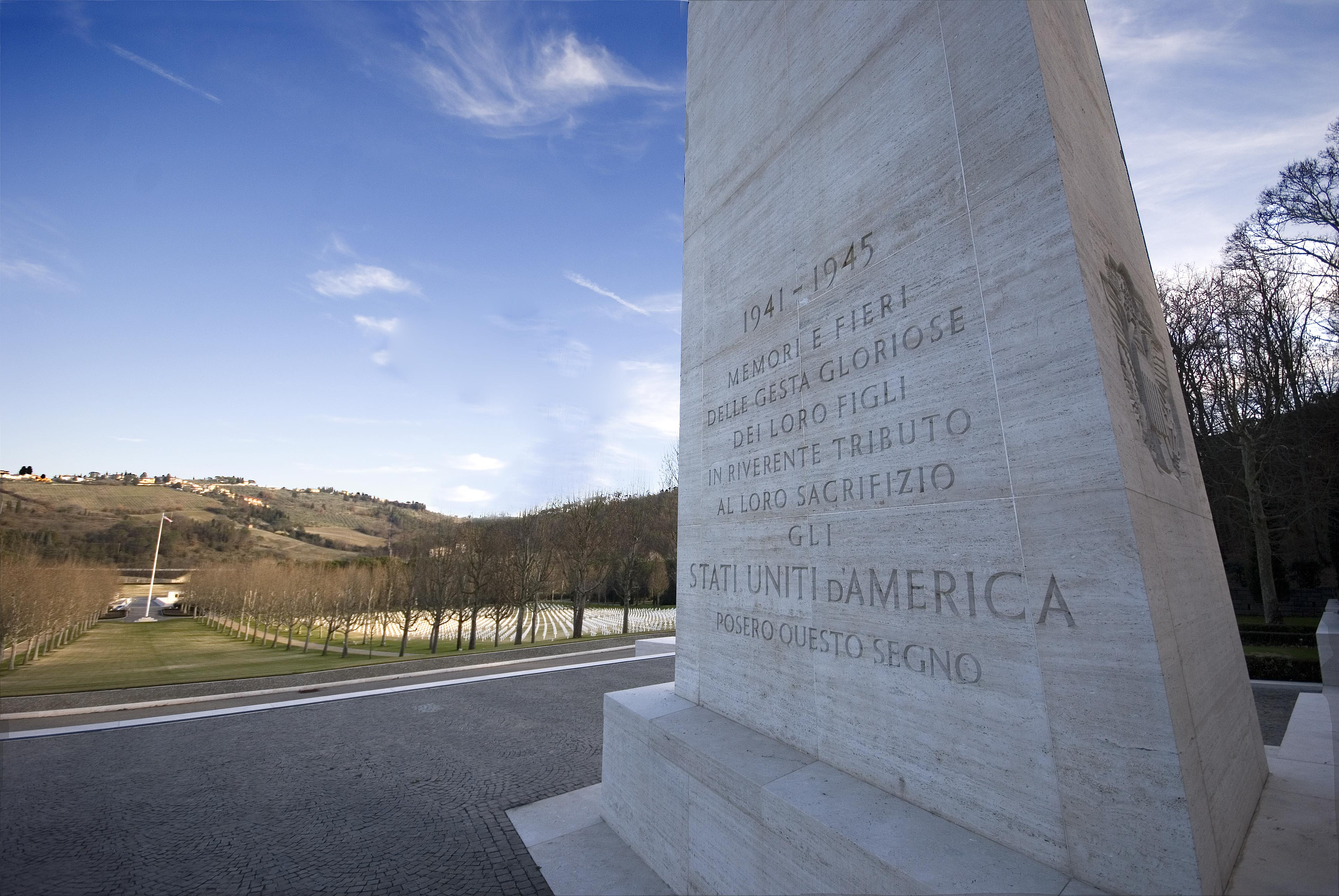 Dettaglio interno del cimitero degli americani dei falciani